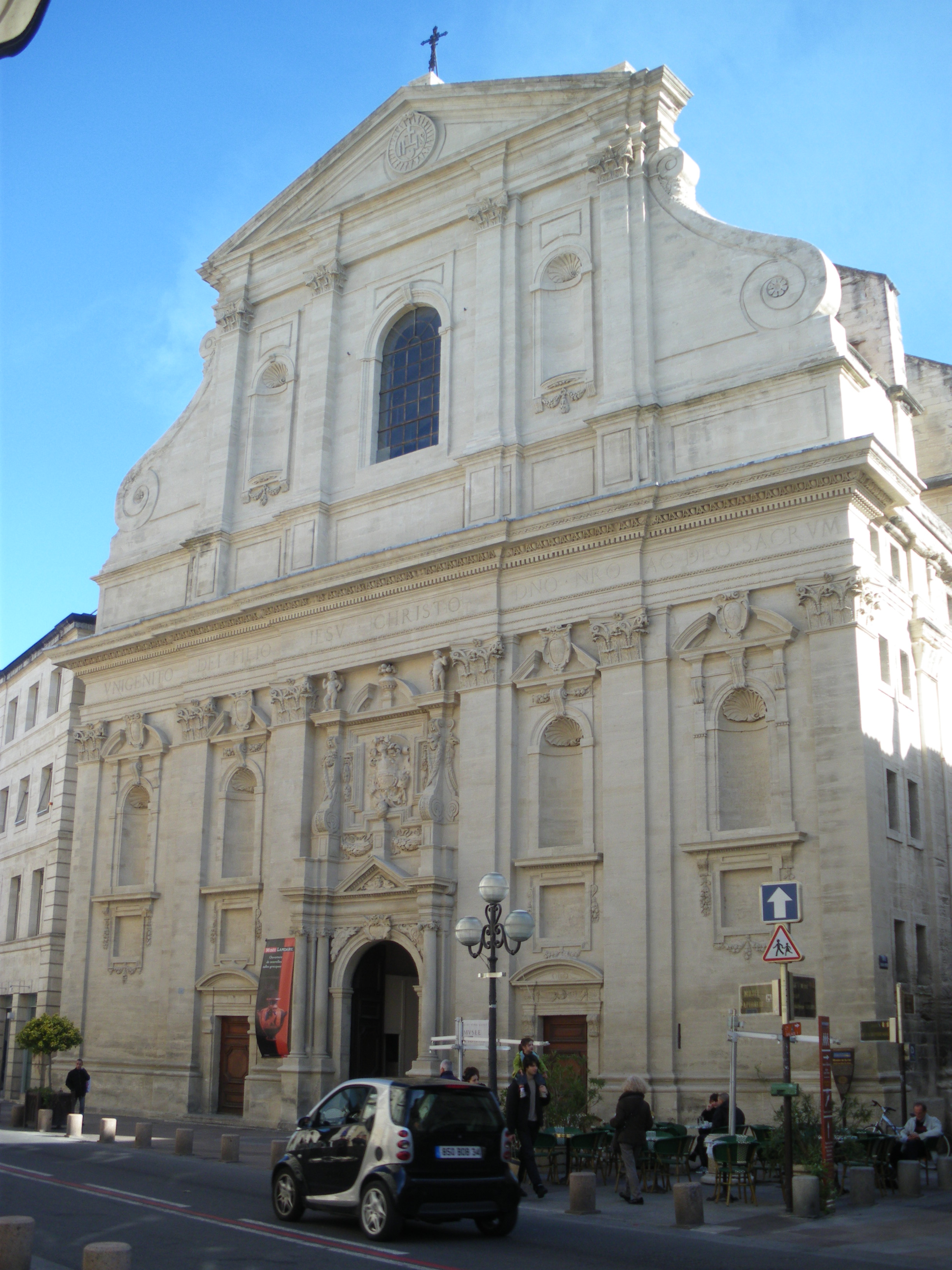 Musée Lapidaire d'Avignon, Vaucluse, France